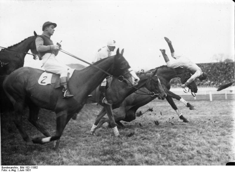 Ein interessantes Bild aus dem grossen Derby in Epsom / England! Ein Teilnehmer stürzt hinter der grossen Hürde während des Rennens.